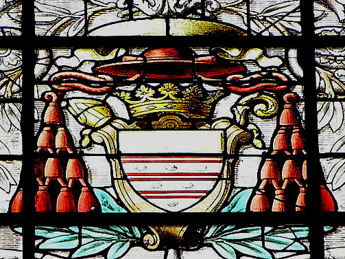 Armes du Cardinal Robert Guibé. Vitrail de la métropole Saint-Pierre de Rennes (35).